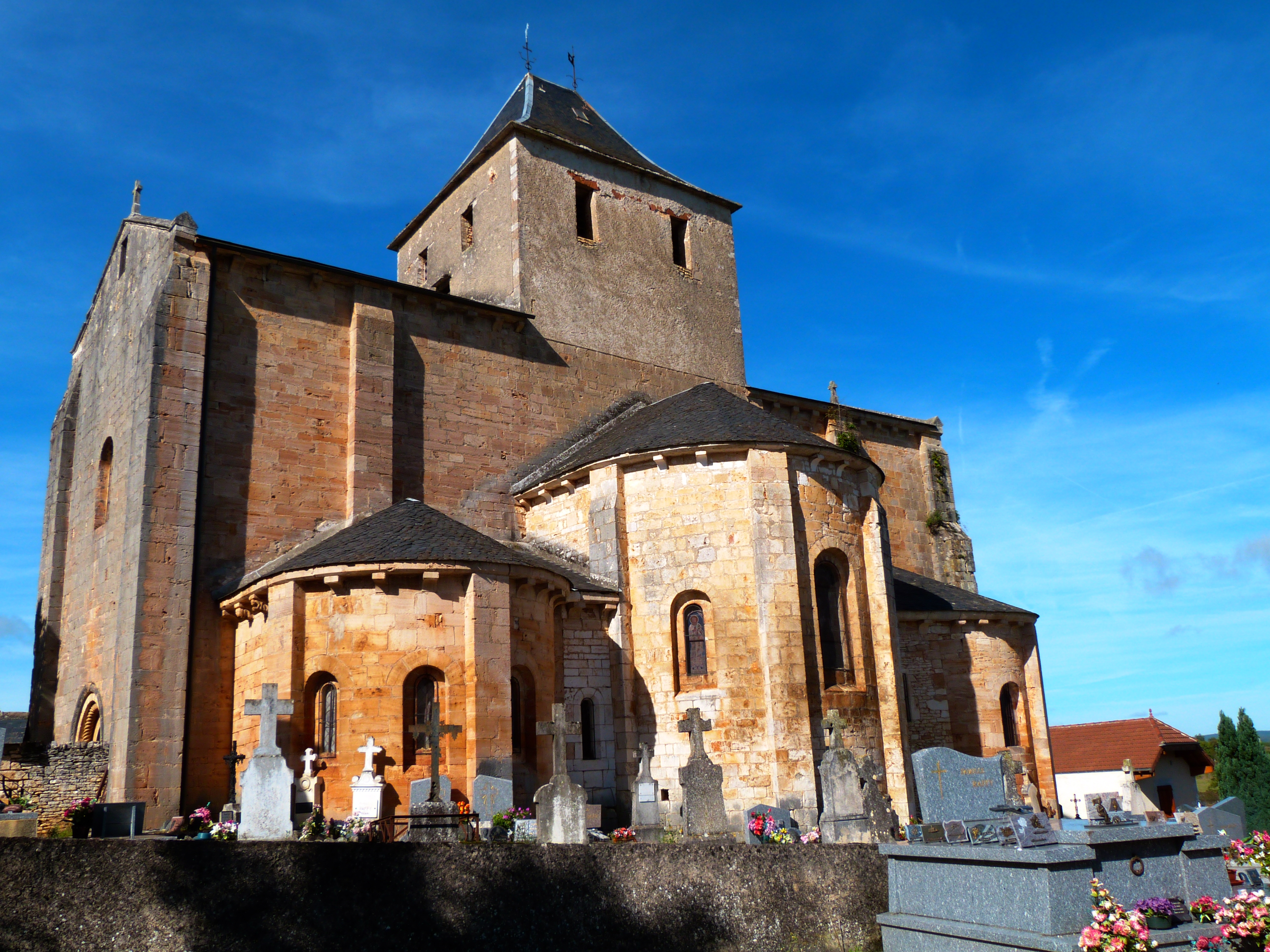 Église Saint-Laurent de Blars